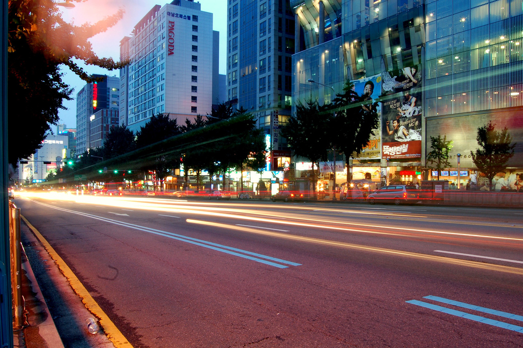 Sinchon, Seodaemun-gu, Seoul